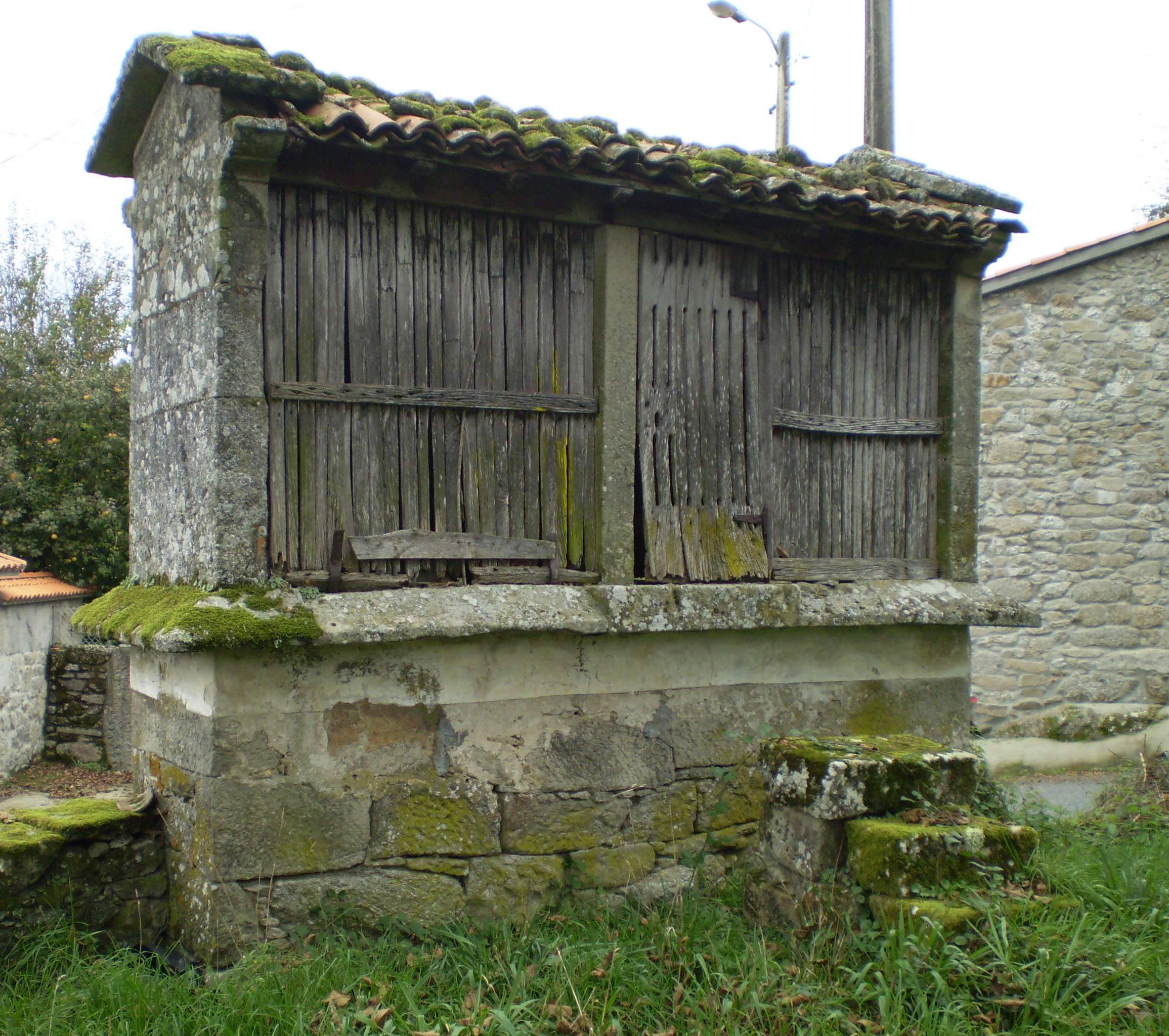 Hórreo tipo mahía, de dous claros, sobre soleira de mampostería. Cuberta de tella do país. Na actualidade non presenta adornos.